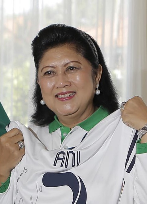 Presiden SBY dan Ibu Ani Yudhoyono merima kaus klub Real Madrid dengan nomor punggung milik Cristiano Ronaldo usai acara penanaman bakau di Nusa Dua, Bali, 26 Juni 2013.